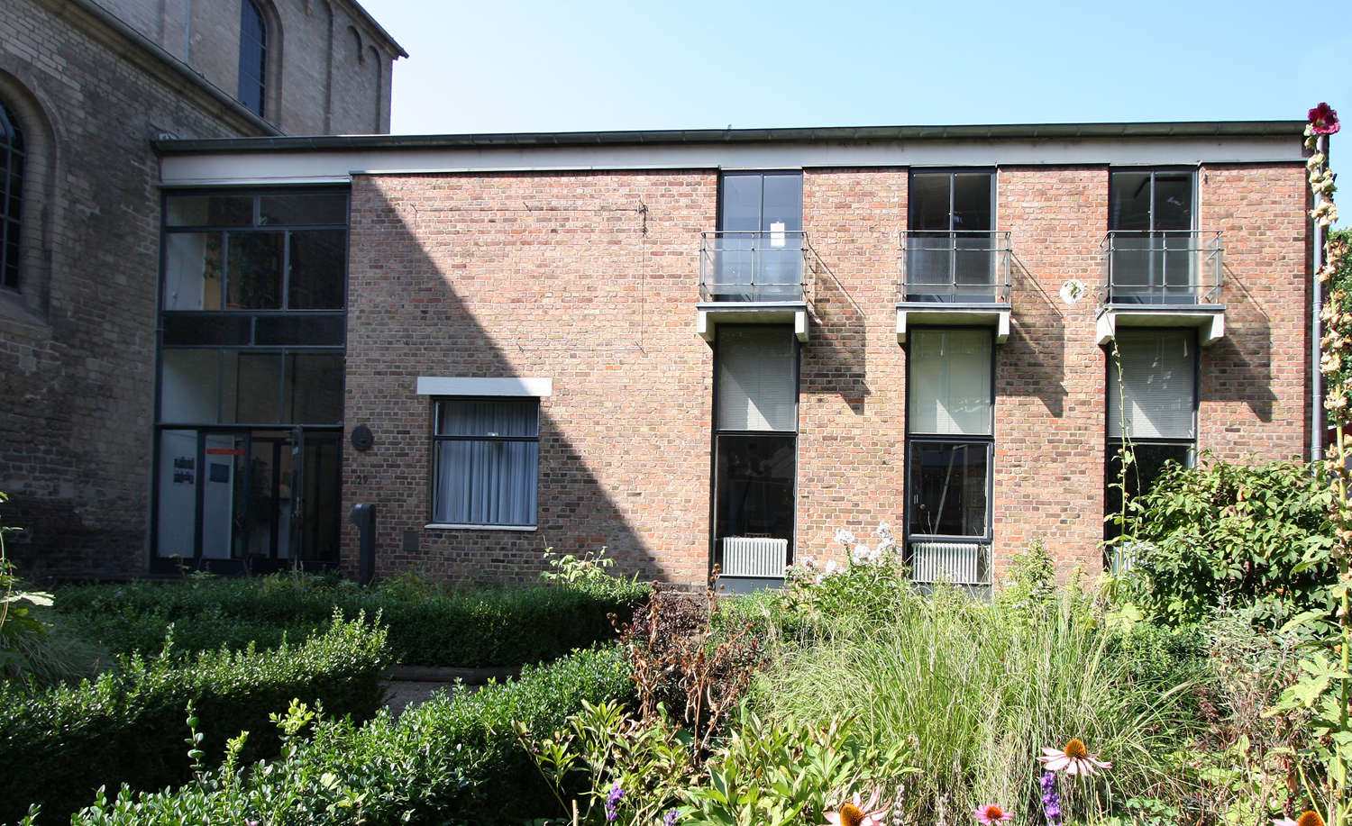 Nachkriegsanbau zur Cäcilienkirche in Köln zwecks Neuaufbau des Schnütgen-Museums. Architekt: Karl Band This is a photograph of an architectural monument.